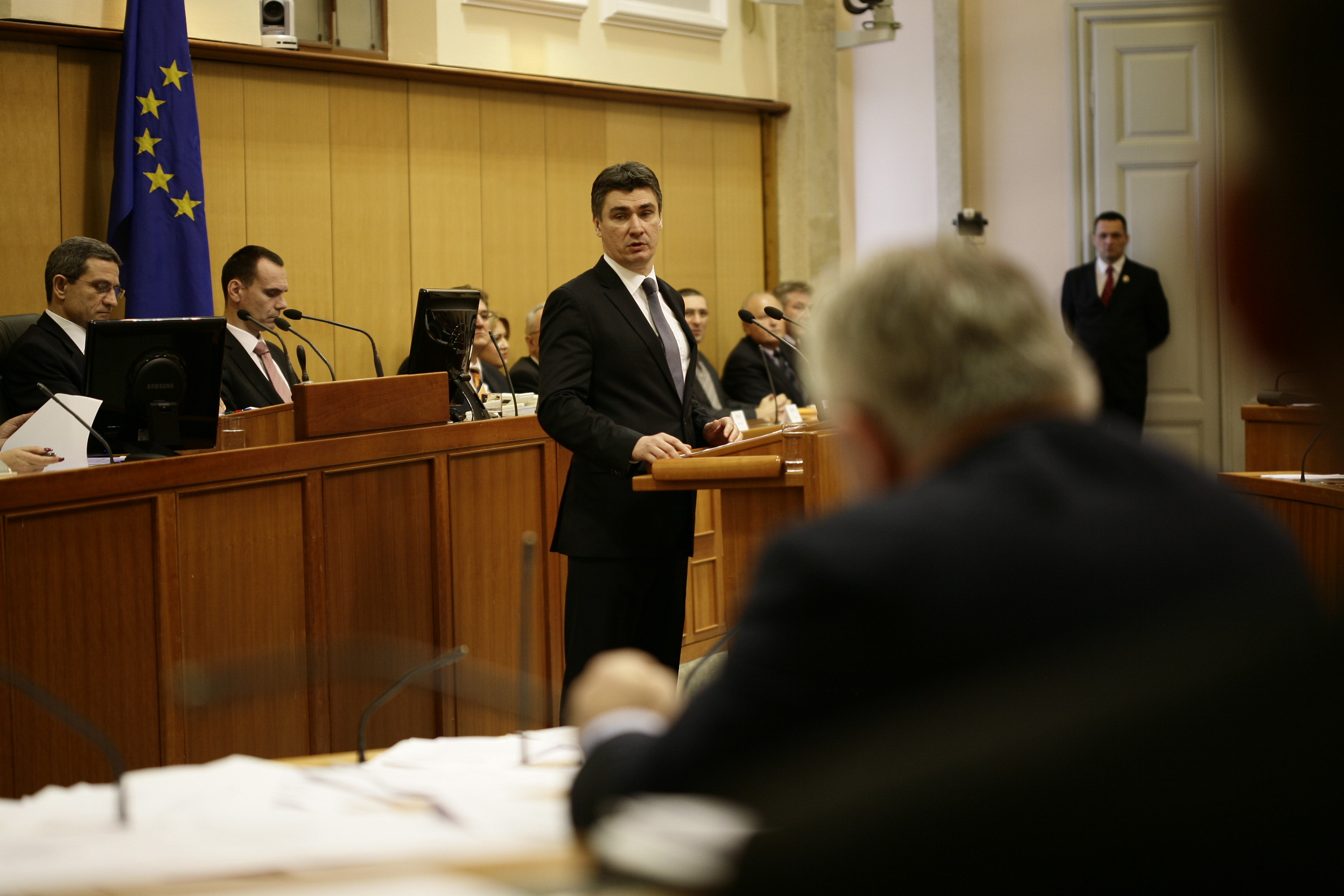 Predstavljanje nove Vlade RH